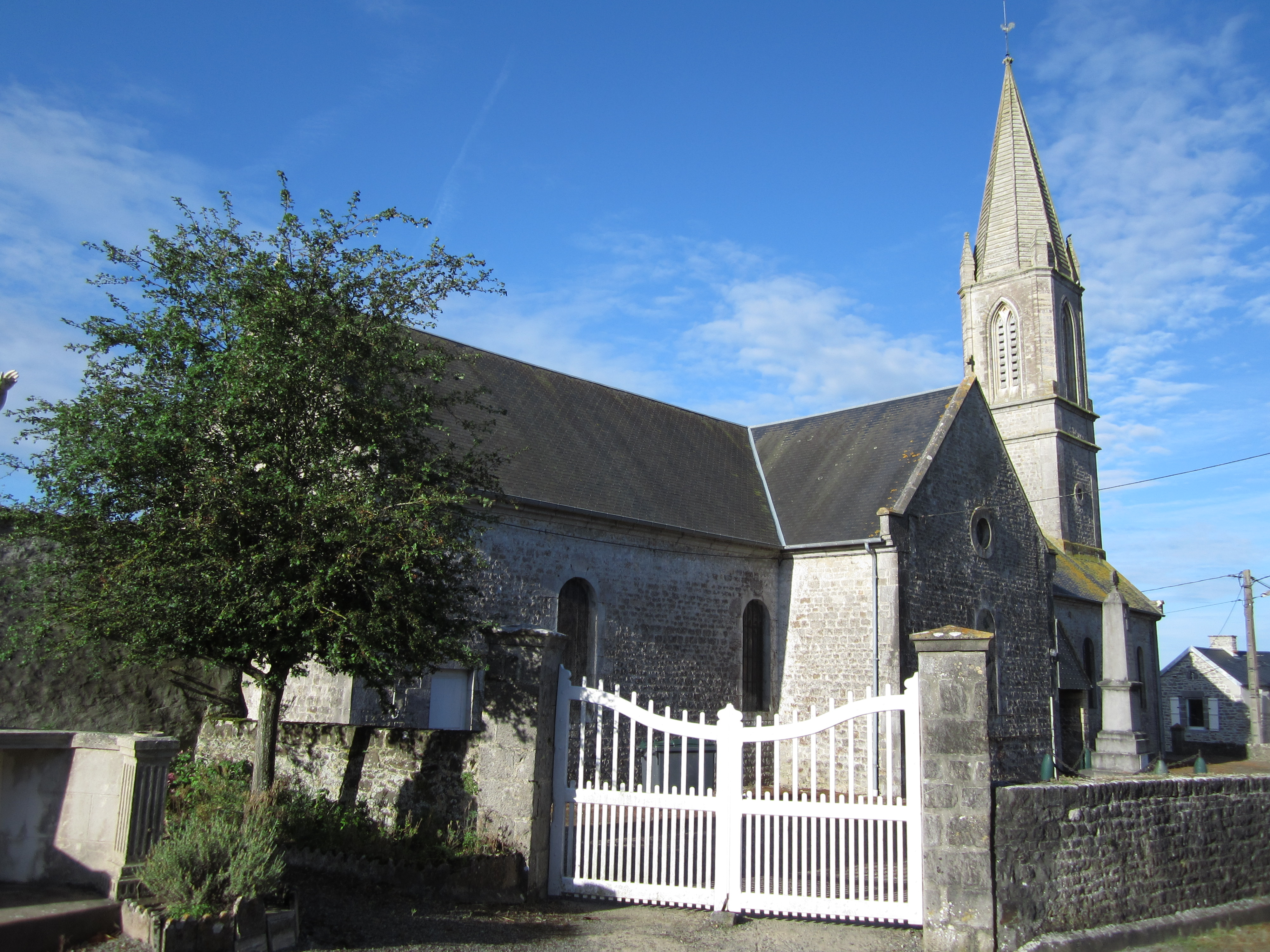 Annoville